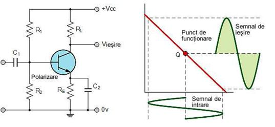 schema electrica si reprezentare grafica a unui amplificator in clasa A